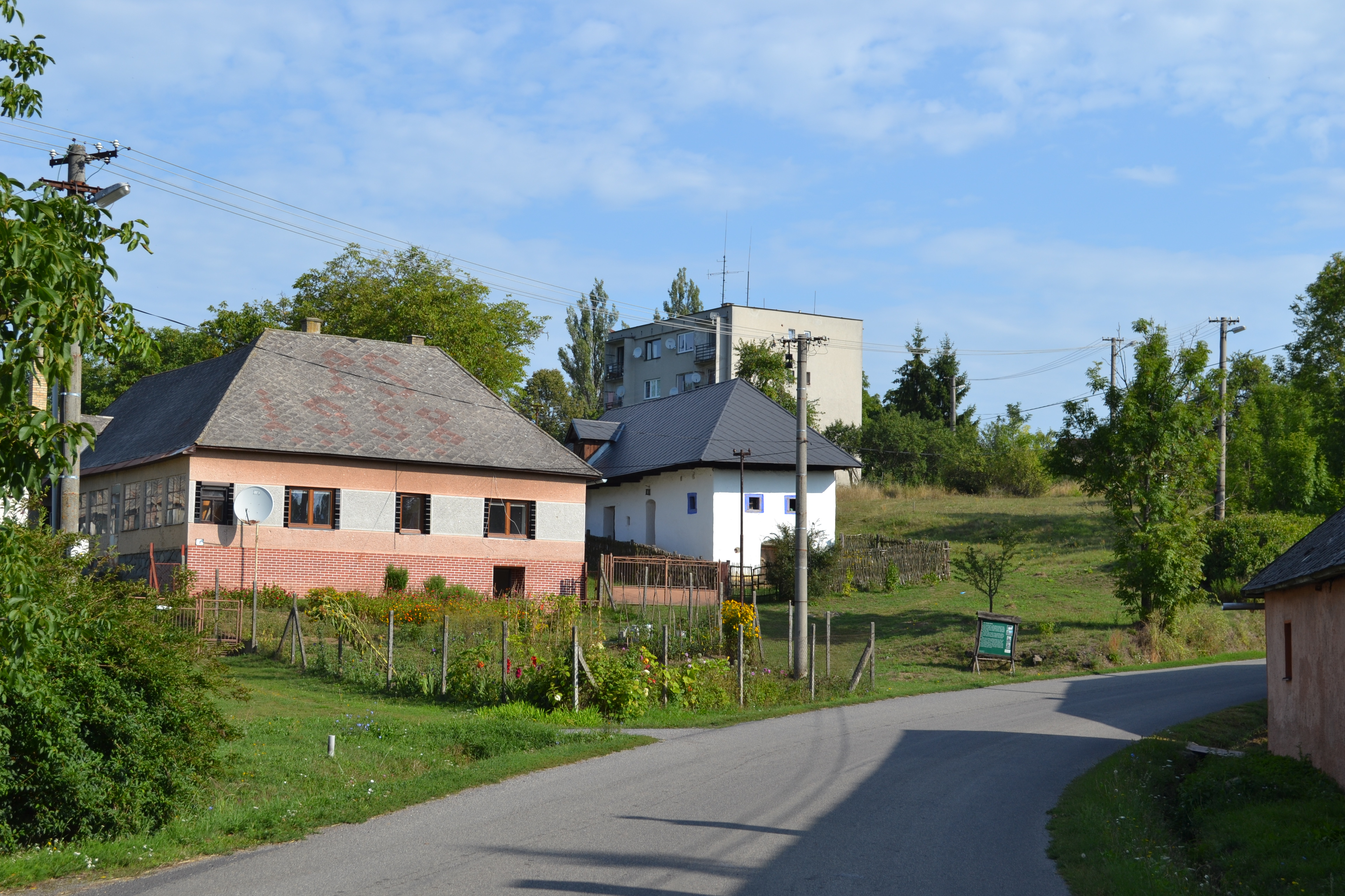 Ľudový č. 7 v Sucháni